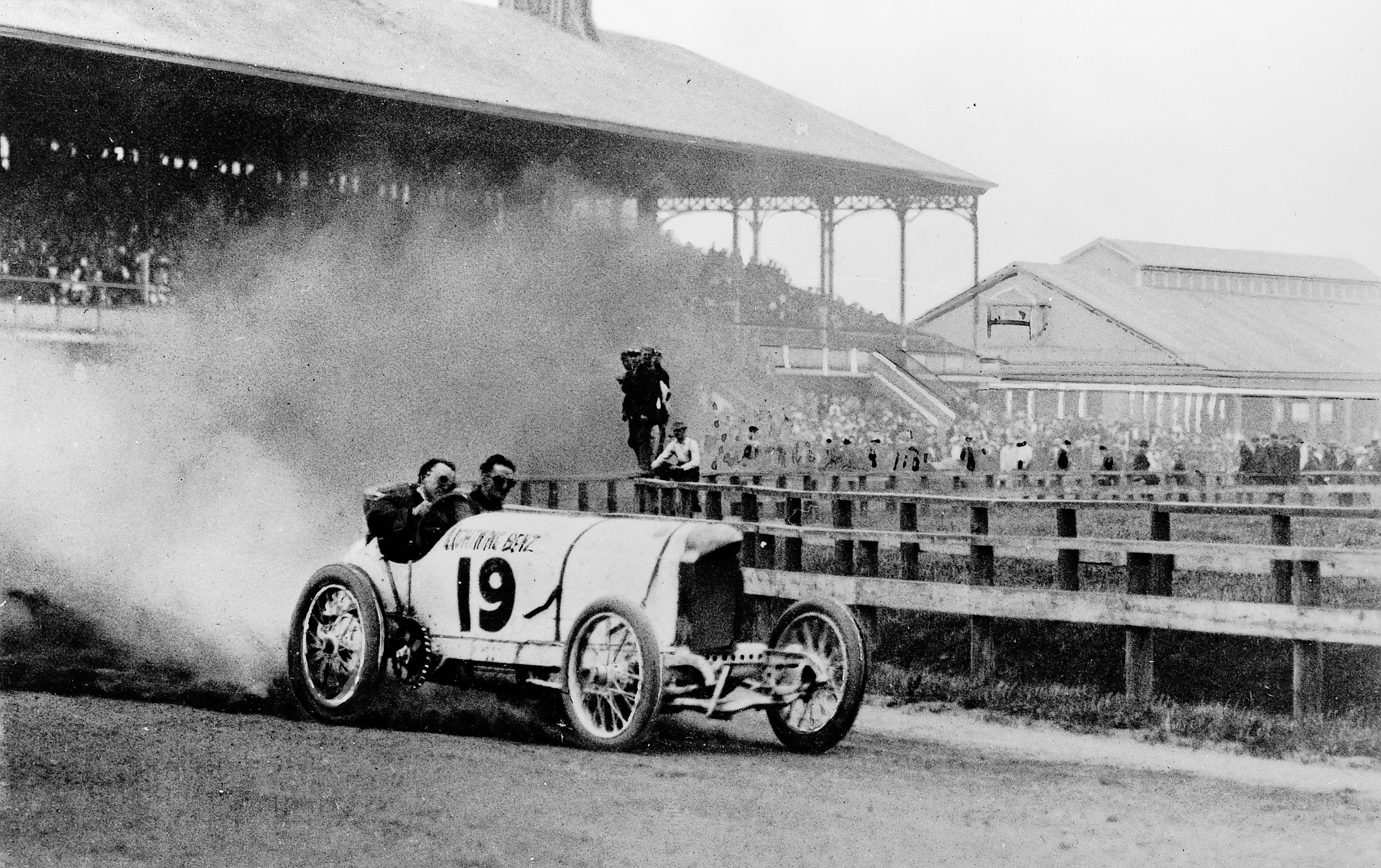 Bildbeschreibung: Blitzen-Benz im Rennen Quelle: Mediaseite der DaimlerChrysler AG Genehmigung: Gern können Sie für Ihre Tätigkeit für die Wikipedia Inhalte der DaimlerChrysler Medienseiten verwenden. Dazu erkennen wir die Bedingungen nach GNU-FDL an. Das Angebot bezieht sich auch auf die vorhandenen Bilder.(Dr.Josef Ernst, Communications, DaimlerChrysler AG)